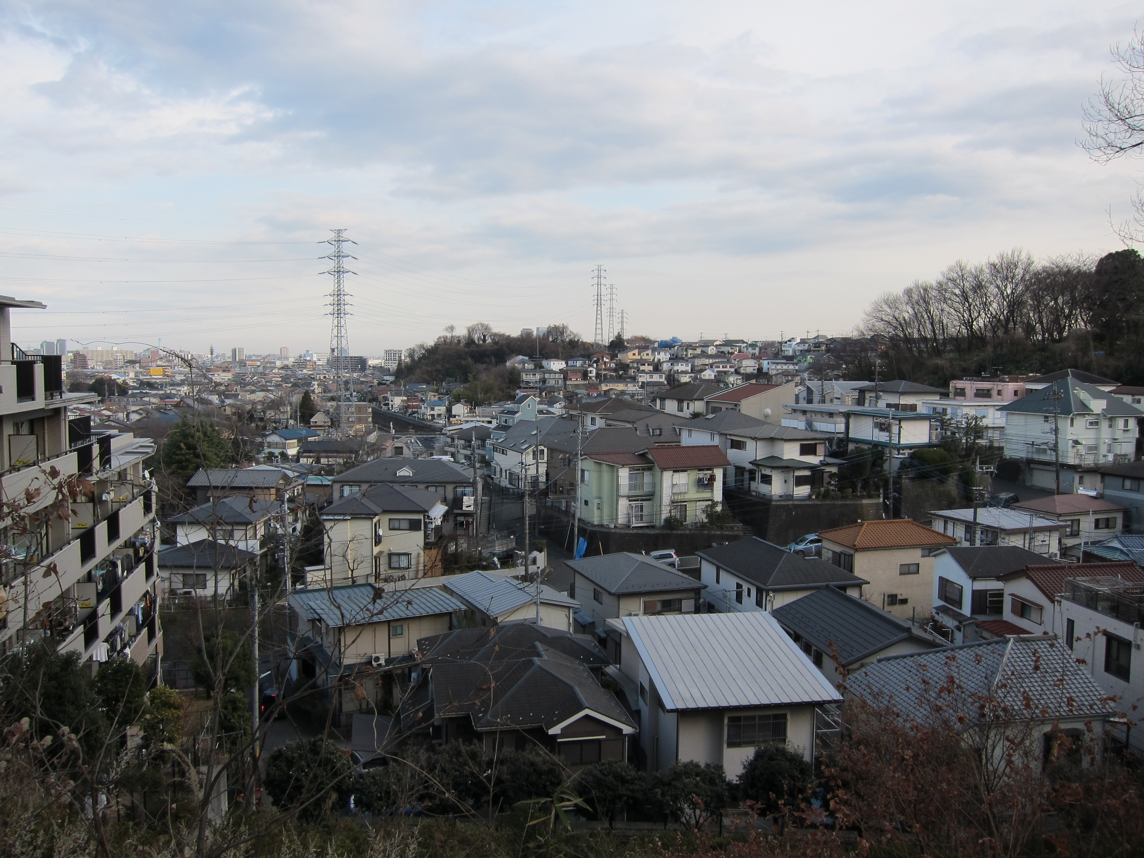 Ida-yama forest , Kawasaki